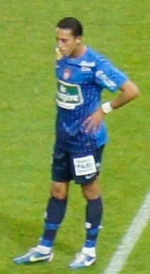 Kamel Chafni jouant au stade Delaune, 2012.